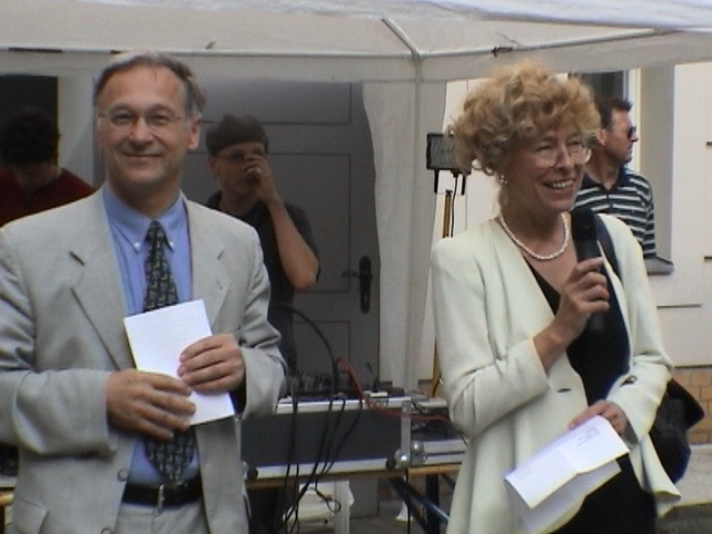 Martin Patzel, Oberbürgermeister von Frankfurt (Oder) (links) und Gesine Schwan, Rektorin der Europa Universität Frankfurt (Oder) (rechts) am 6. Juli 2002 auf dem Sommerfest der Europa Universität Viadrina Frankfurt (Oder) im Innenhof des Hauptgebäudes des Europa Universität Viadrina Frankfurt (Oder).